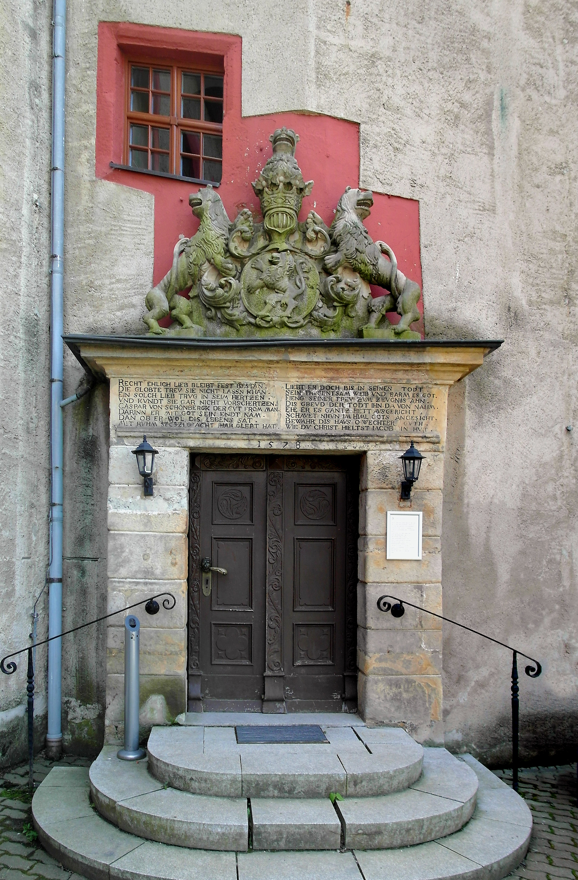 02.06.2015 09526 Pfaffroda: Seniorenheim Schloss Pfaffroda, Am Schloßberg 8. Portal am Wendelstein.[SAM0672.JPG]20150602315DR.JPG(c)Blobelt